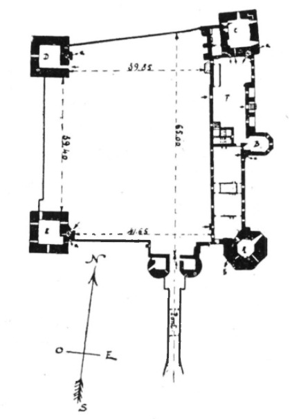 Grundriss des Schlosses Havré in Mons, Belgien